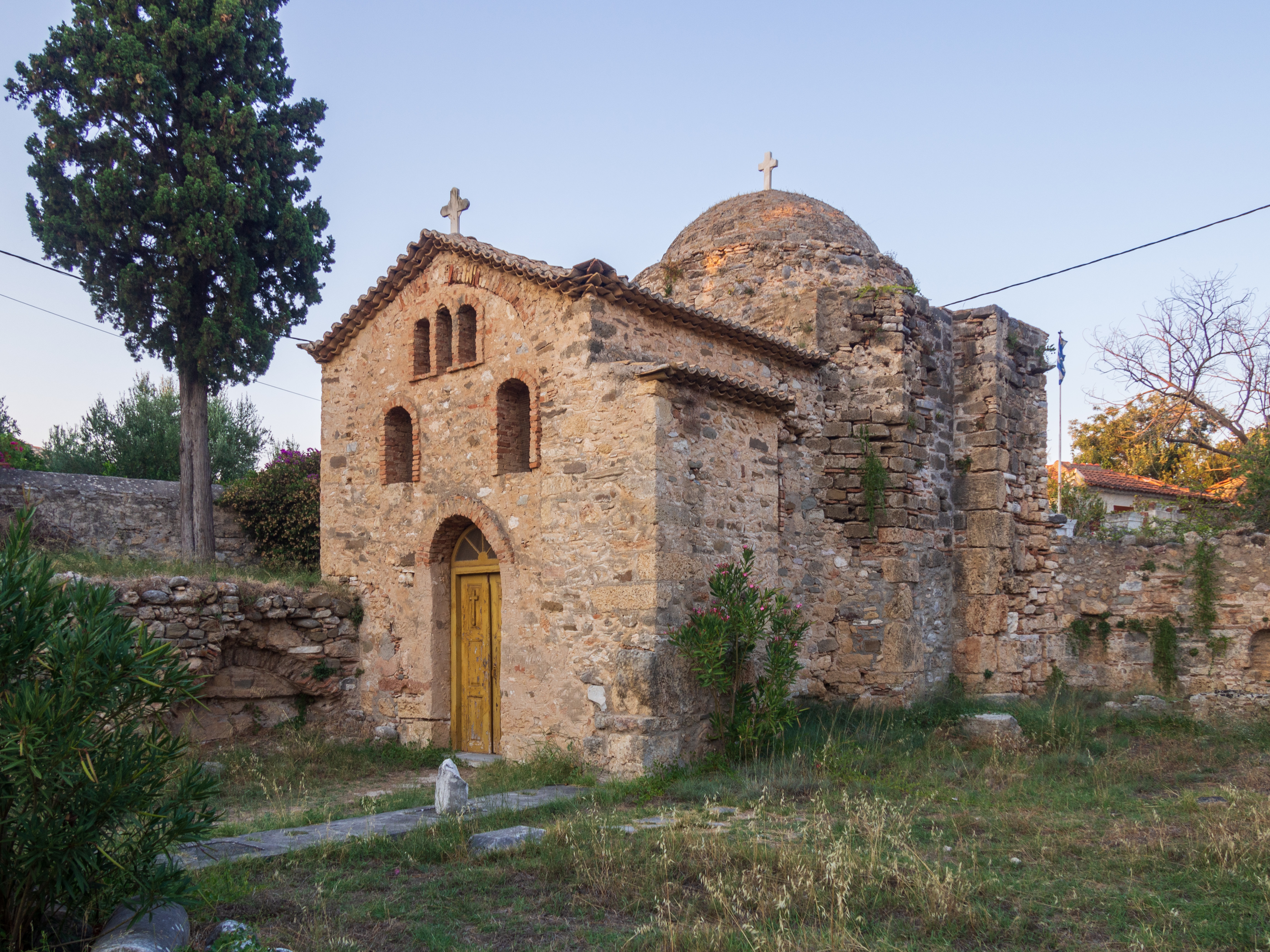 Κάστρο Κορώνης, ο βυζαντινός ναός της Αγίας Σοφίας«Κάστρο Κορώνης»